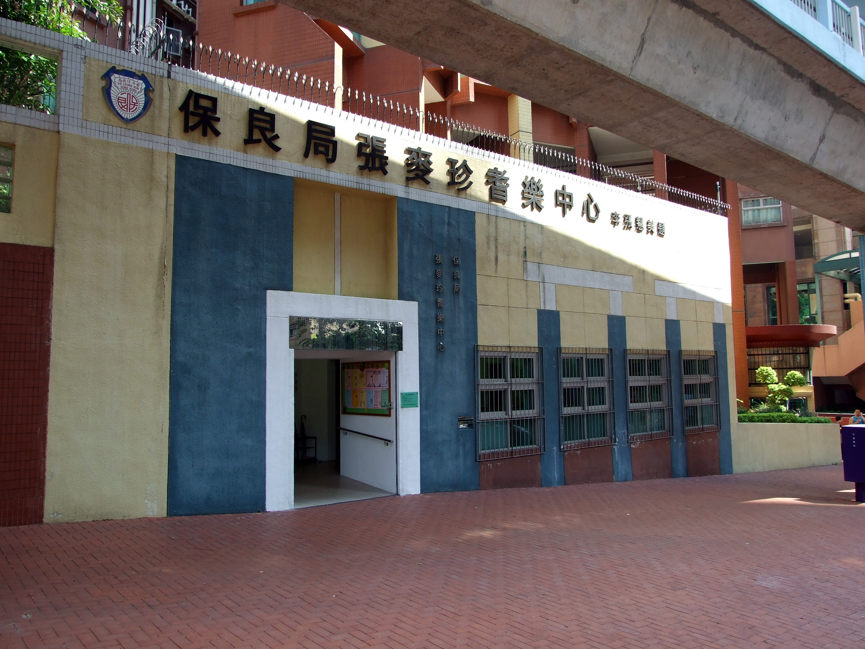 中文（香港）: 保良局張麥珍耆樂中心